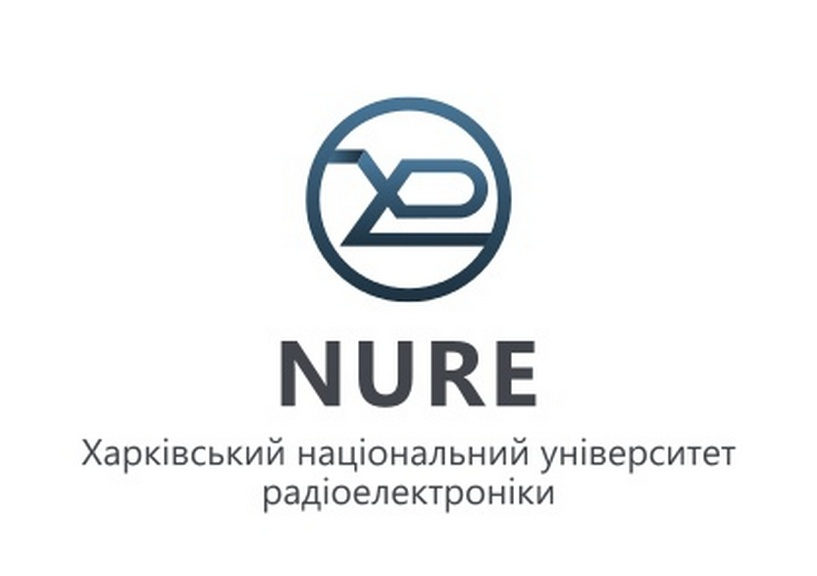 ЕМБЛХНУРЕ2016